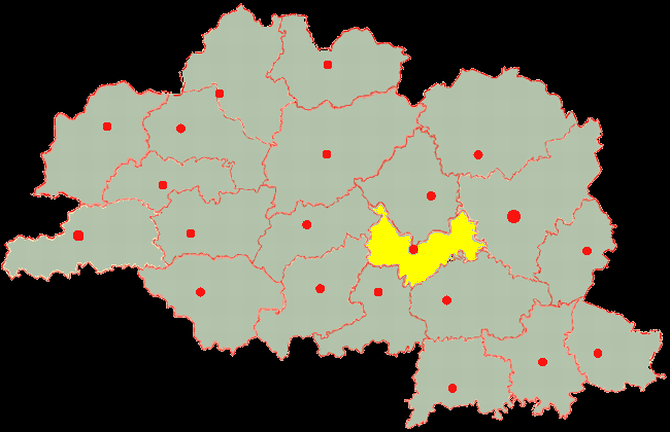 Vitebsk-obl-Beshenkovichi region